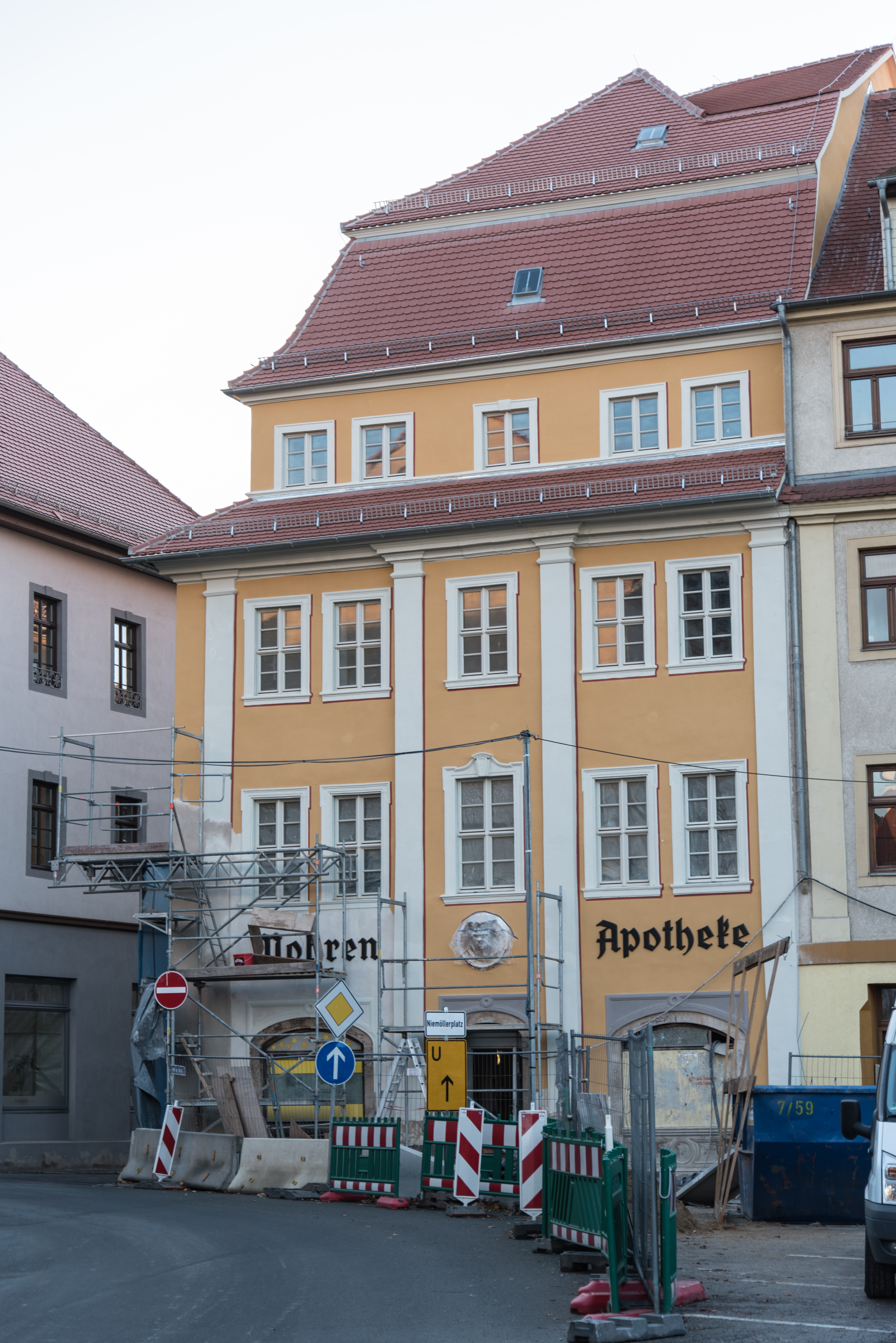 Weißenfels, Markt 3